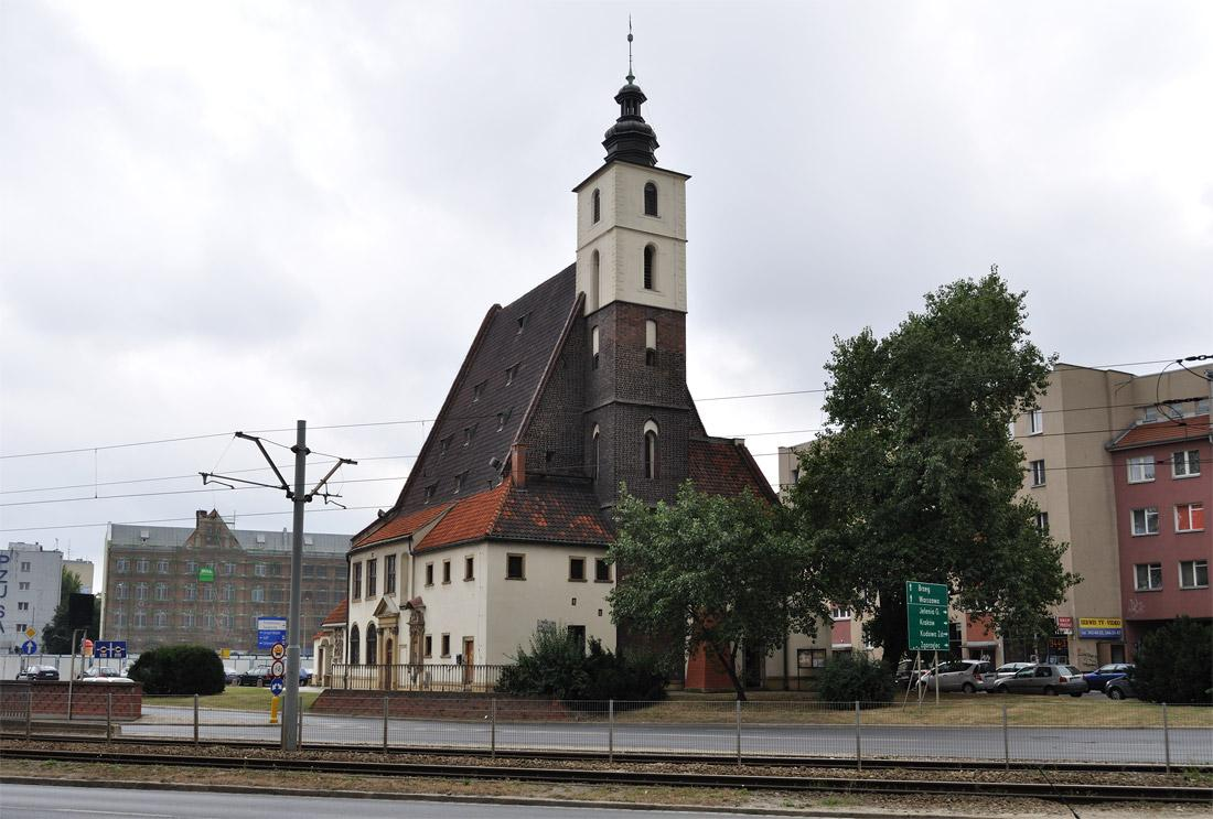 Kościół św. Krzysztofa a za nim budowa, która nie może się od kilku lat zacząć.